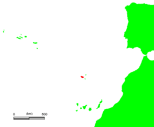 PT Madeira.PNG